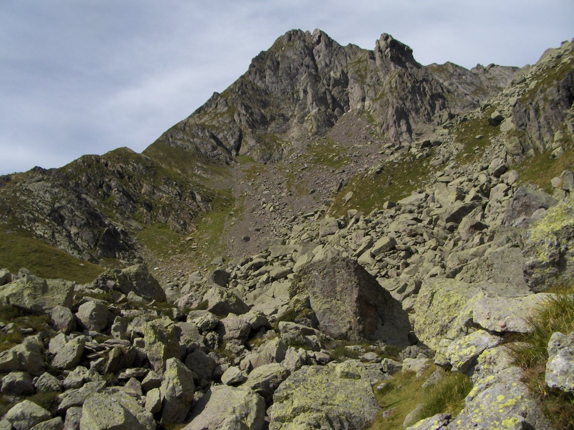 Pizzo dei 3 Signori: vetta di 2554 m. s.l.m sullo sparti-acque fra Bergamo-Sondrio-Lecco lungo la catena delle orobie. Vista dal versante di Ornica (BG)